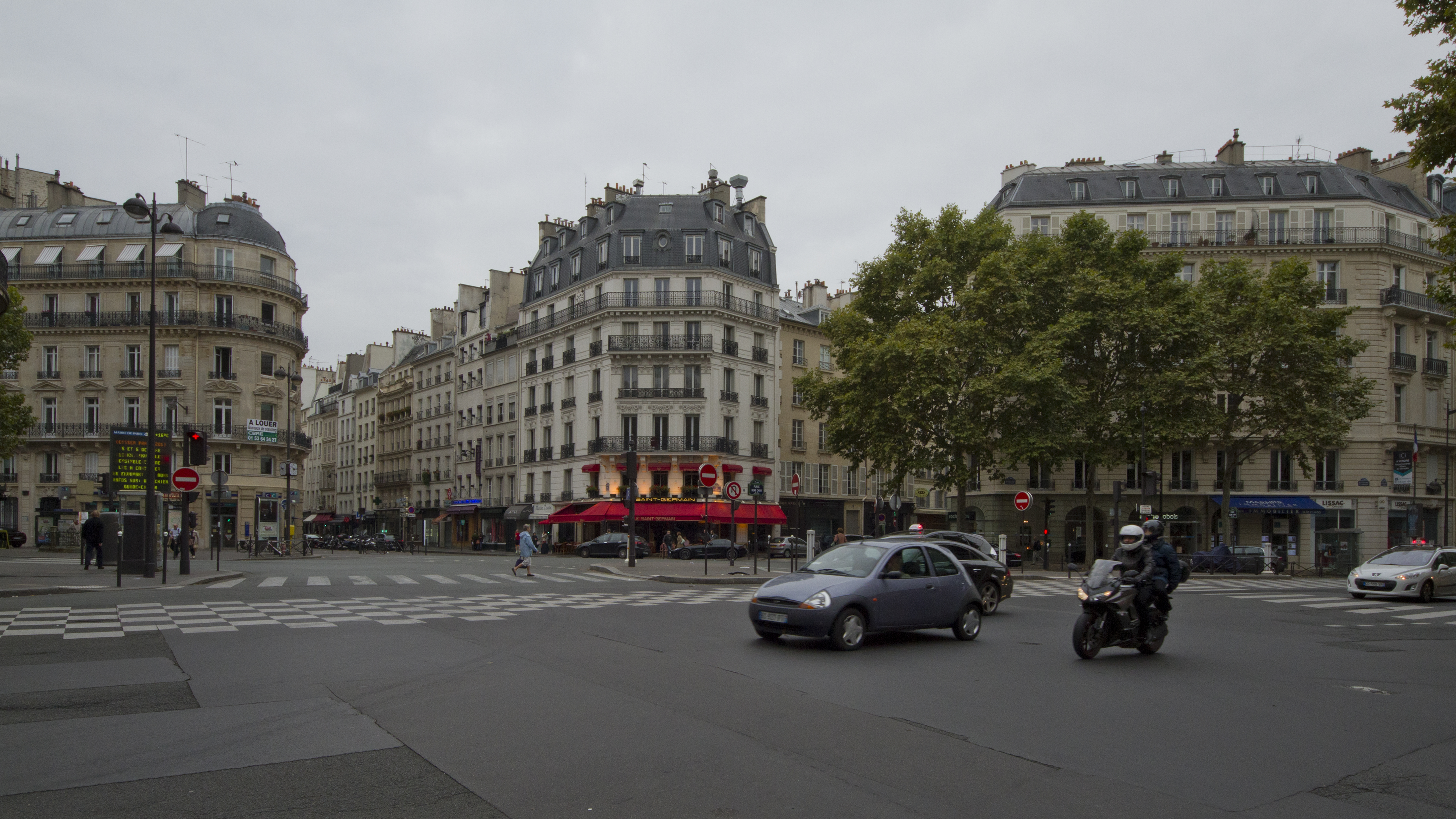 Place René Char, Saint-Thomas d'Aquin, Paris, France